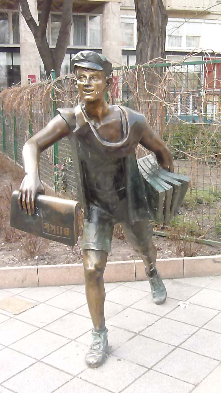 A felvétel 2015. március 15-én készült Budapesten, a József Attila utcában. Rikkancs.